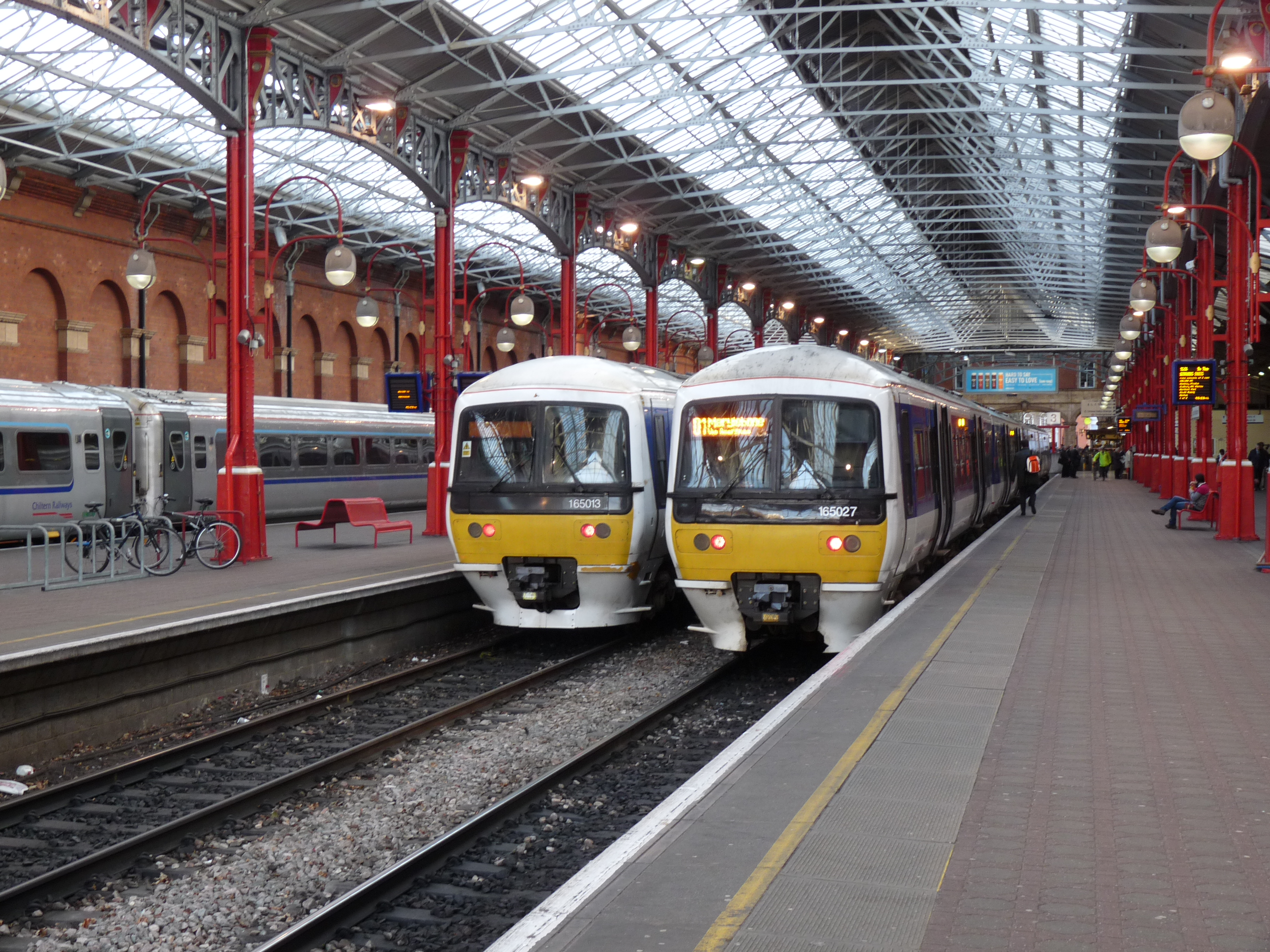 Treinen in Marylebone station